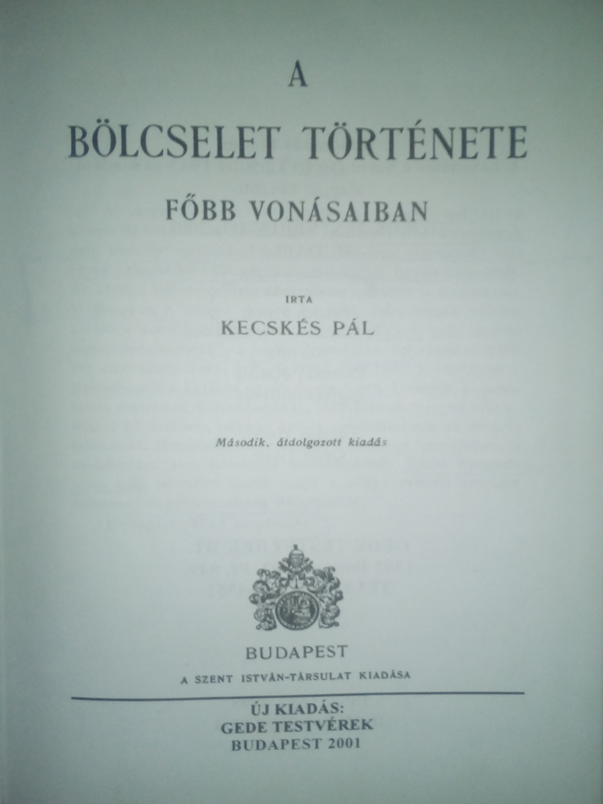 Az adott mű címlapja.